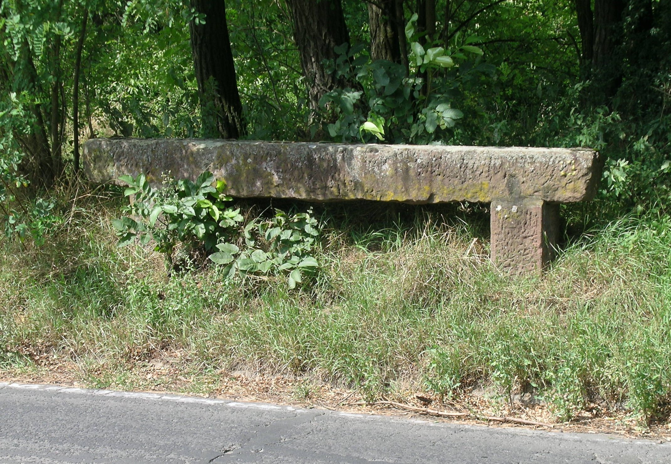 Ruhstein gegenüber Steinkreuz (Ruhkreuz), Odenwaldstraße, Wörth am Main, AktenNr. D-6-76-169-20